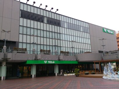 イースト21内サミット